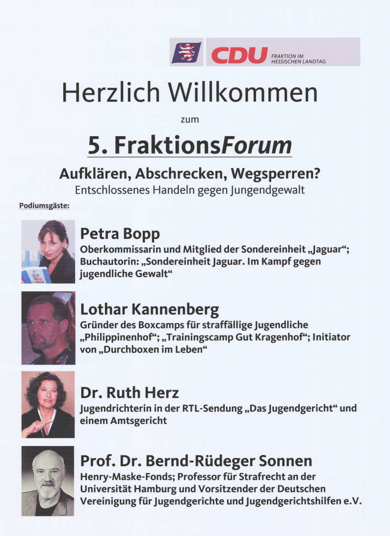 Herzlich Willkommen zum 5. FraktionsForum Aufklären, Abschrecken, Wegsperren? Entschlossenes Handeln gegen Jugendgewalt Podiumsgäste: Petra Bopp Oberkommissarin ..., Buchautorin Lothar Kannenberg Gründer des Boxcamps für straffällige Jugendliche "Philippinenhof" ... Dr. Ruth Herz Jugendrichterin ... Prof. Dr. Bernd-Rüdeger Sonnen Henry-Maske-Fonds; Professor für Strafrecht ... Abbildung: Porträtfotos Plakatart: Ankündigungsplakat Auftraggeber: CDU Fraktion im Hessischen Landtag Objekt-Signatur: 10-031 : 75 Bestand: CDU-Plakate (10-031) GliederungBestand10-18: CDU-Plakate (10-031) » Parteitage, Parteikongresse Lizenz: KAS/ACDP 10-031 : 75 CC-BY-SA 3.0 DE